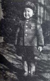 김정일